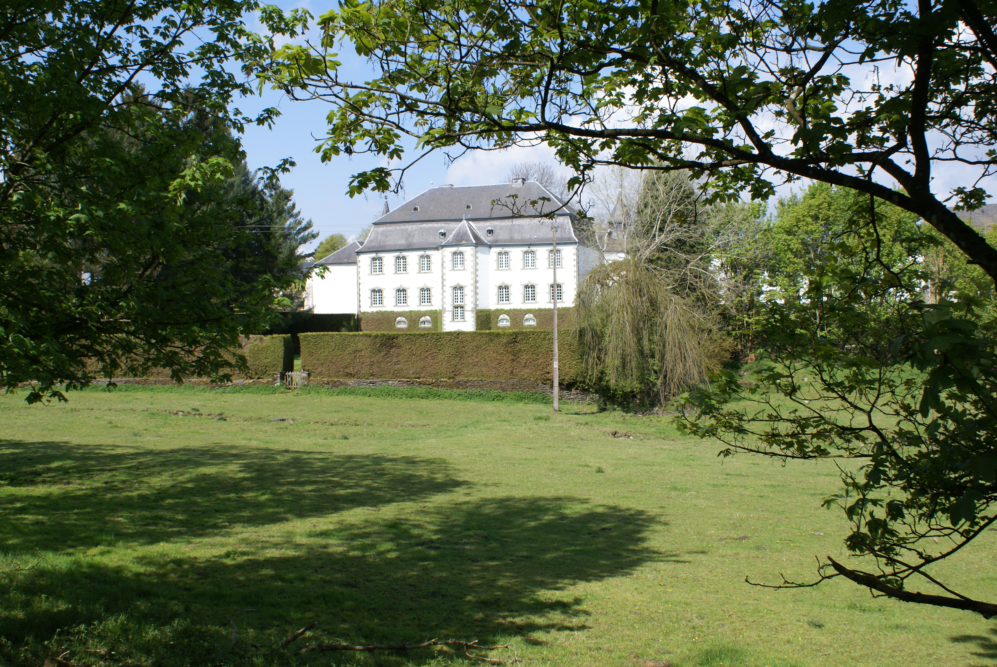 Jardin et façade arriere du chateau de Steinbach